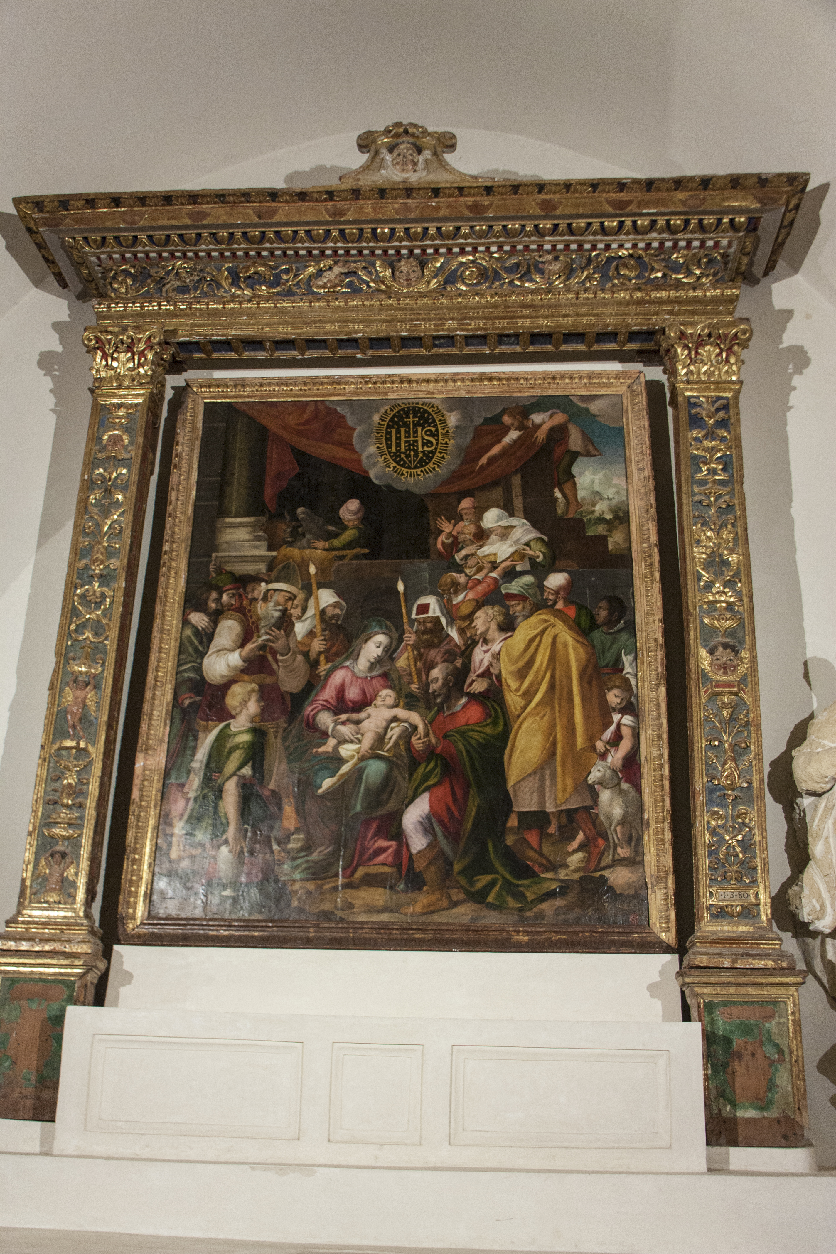 Circoncisione di Gesù - Simone de Wobrek cm 227x184 olio su tavola presso Cappella del nome di Gesù